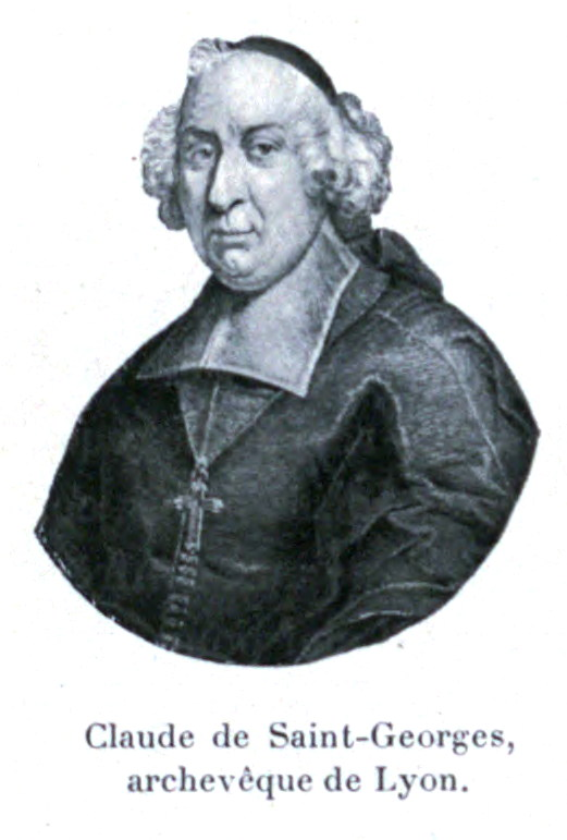 Illustration pour l'Histoire des églises et chapelles de Lyon